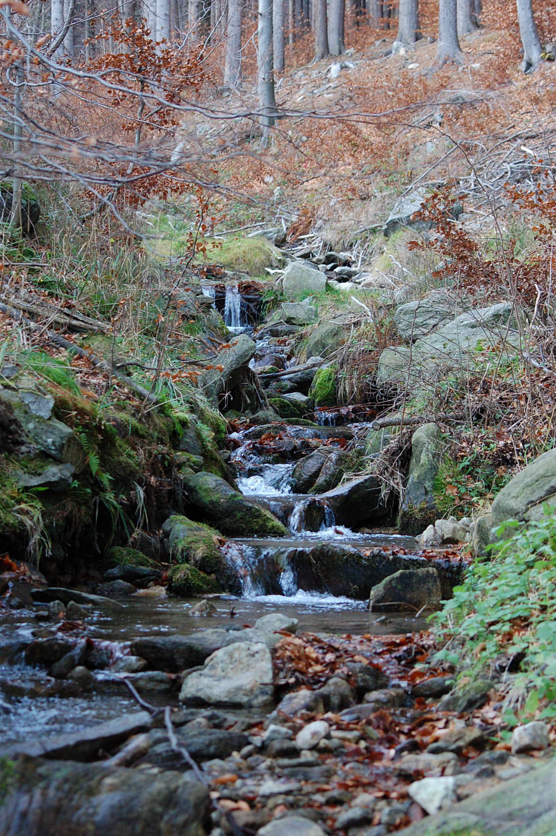 Potok górski w Sudetach